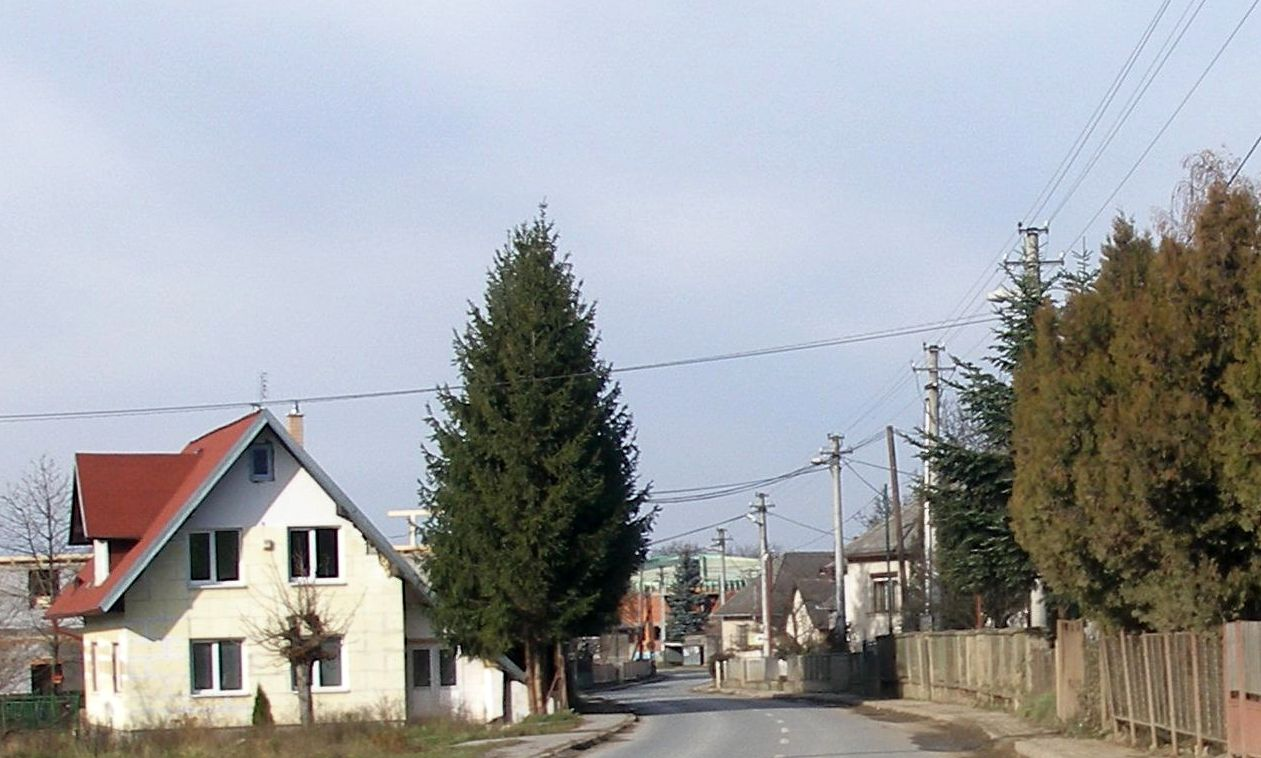 Obec Dulová Ves v okrese Prešov